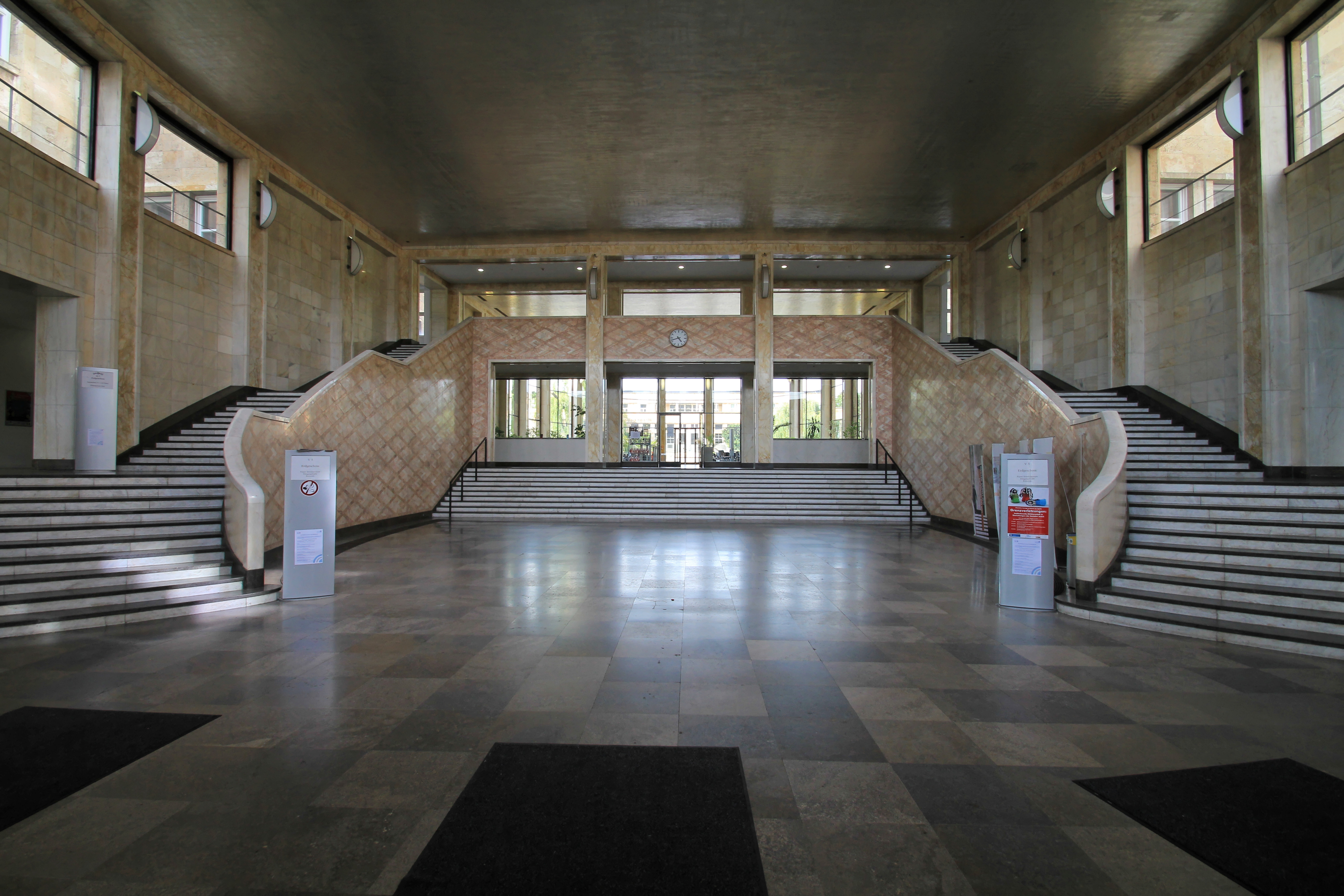 I.G.-Farben-Haus Eingangshalle